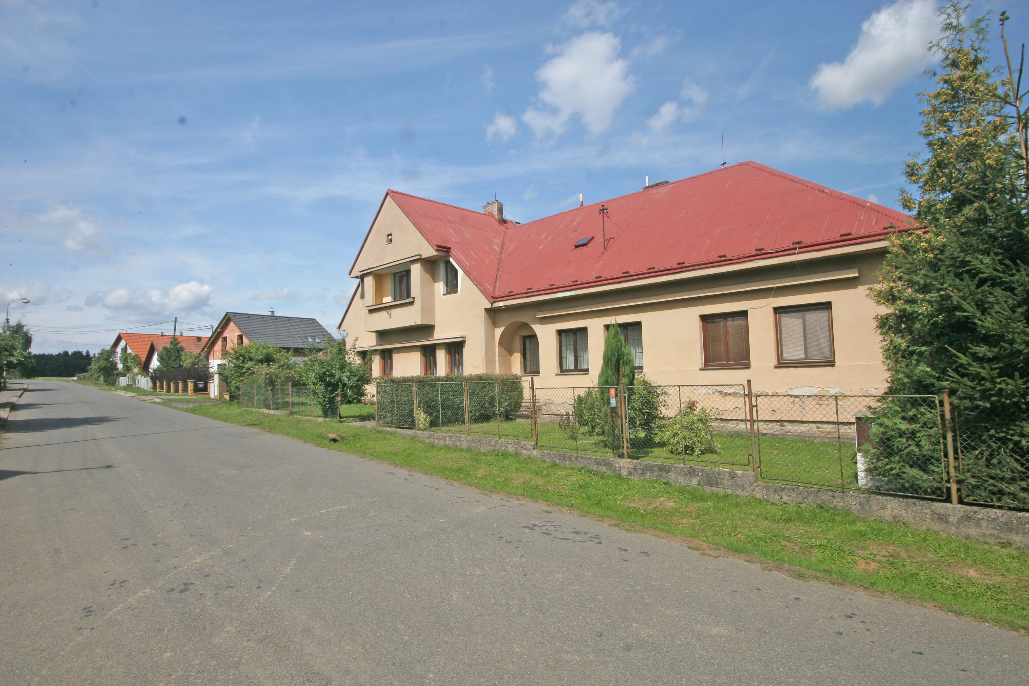 Licomělice čp. 50